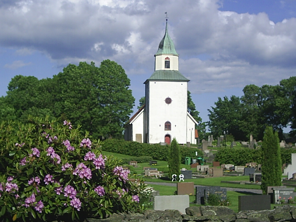 Skepplanda församlings kyrka. Fotograf:Tubaist